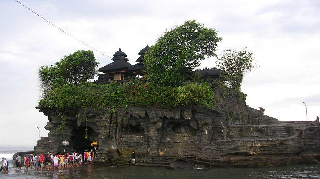 Pura Tanah Lot diambil bulan Desember 2004